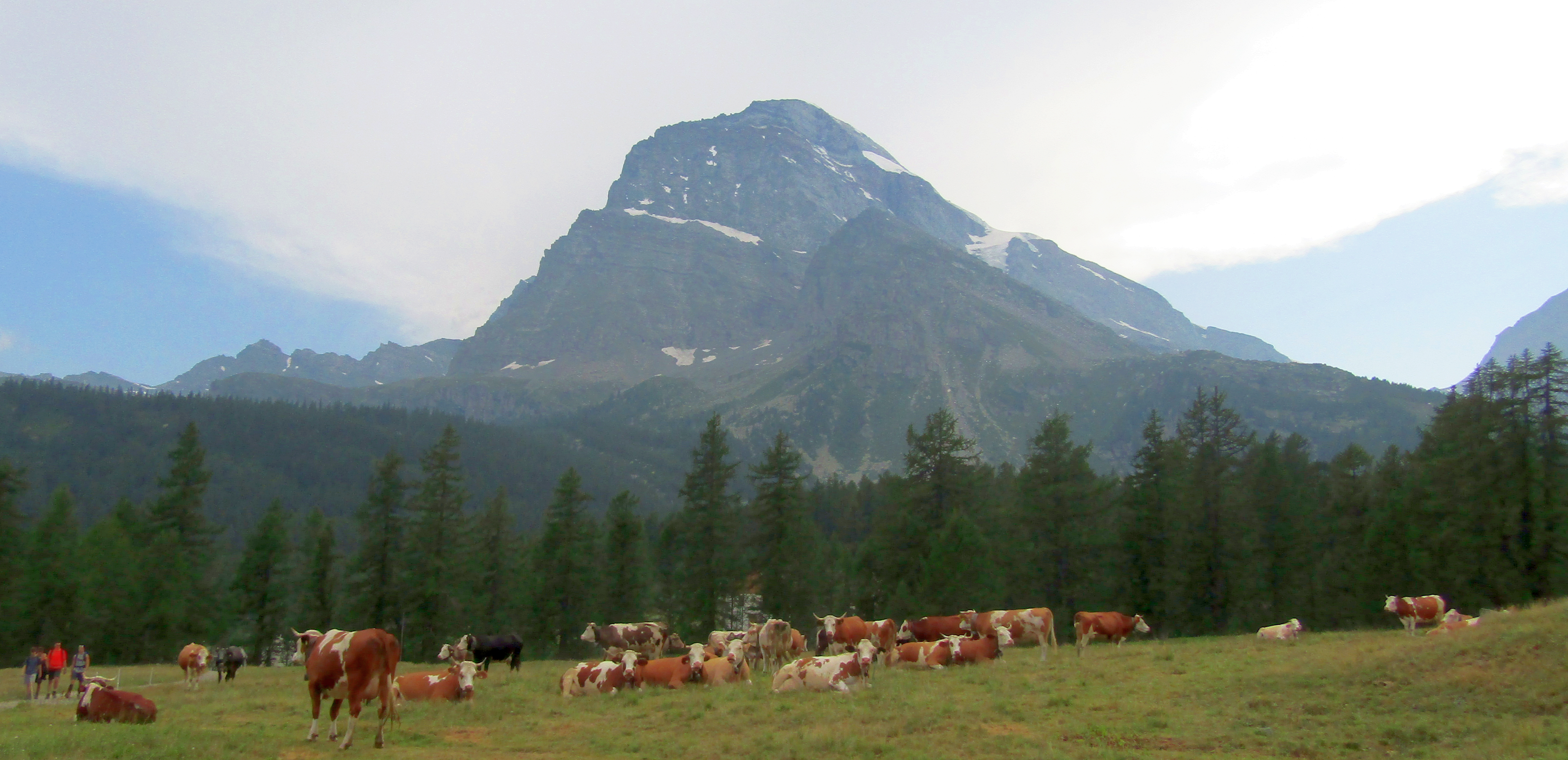 Parco naturale dell'Alpe Veglia e dell'Alpe Devero - Il Monte Leone dall'Alpe Veglia This is a photo of a monument which is part of cultural heritage of Italy.